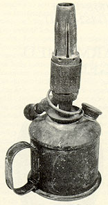 Tidig blåslampa, troligen Nybergs fabrikat